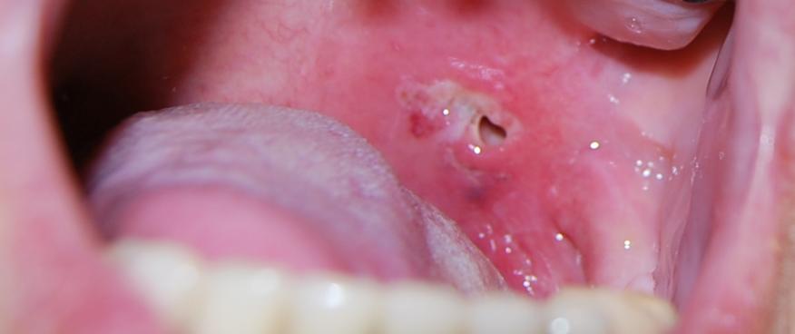 Absceso periamigdalino tras cirugía